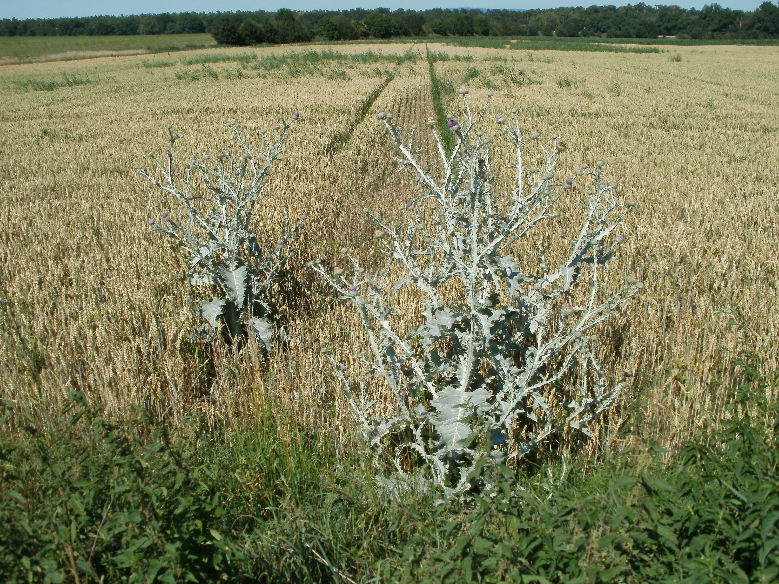 Weizenfeld bei Hockenheim mit Disteln